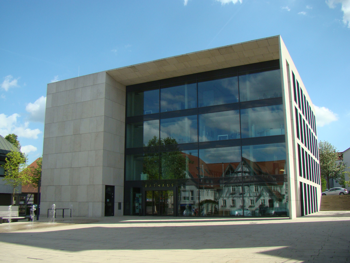 Rathaus in Leingarten, Lkr. Heilbronn